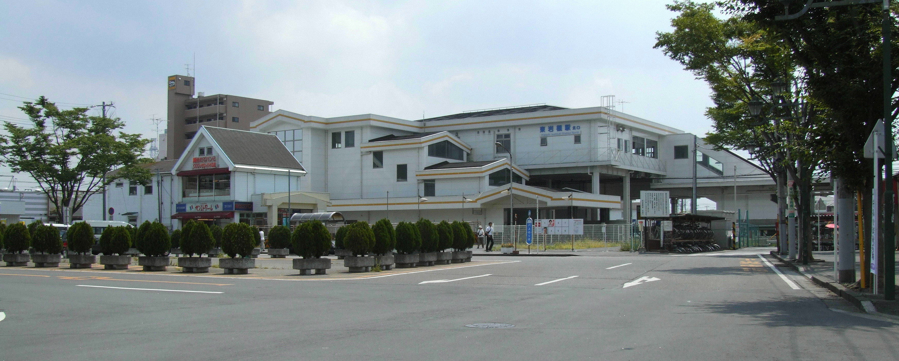 Higashi-Iwatsuki Station. Saitama, Saitama prefecture, Japan.